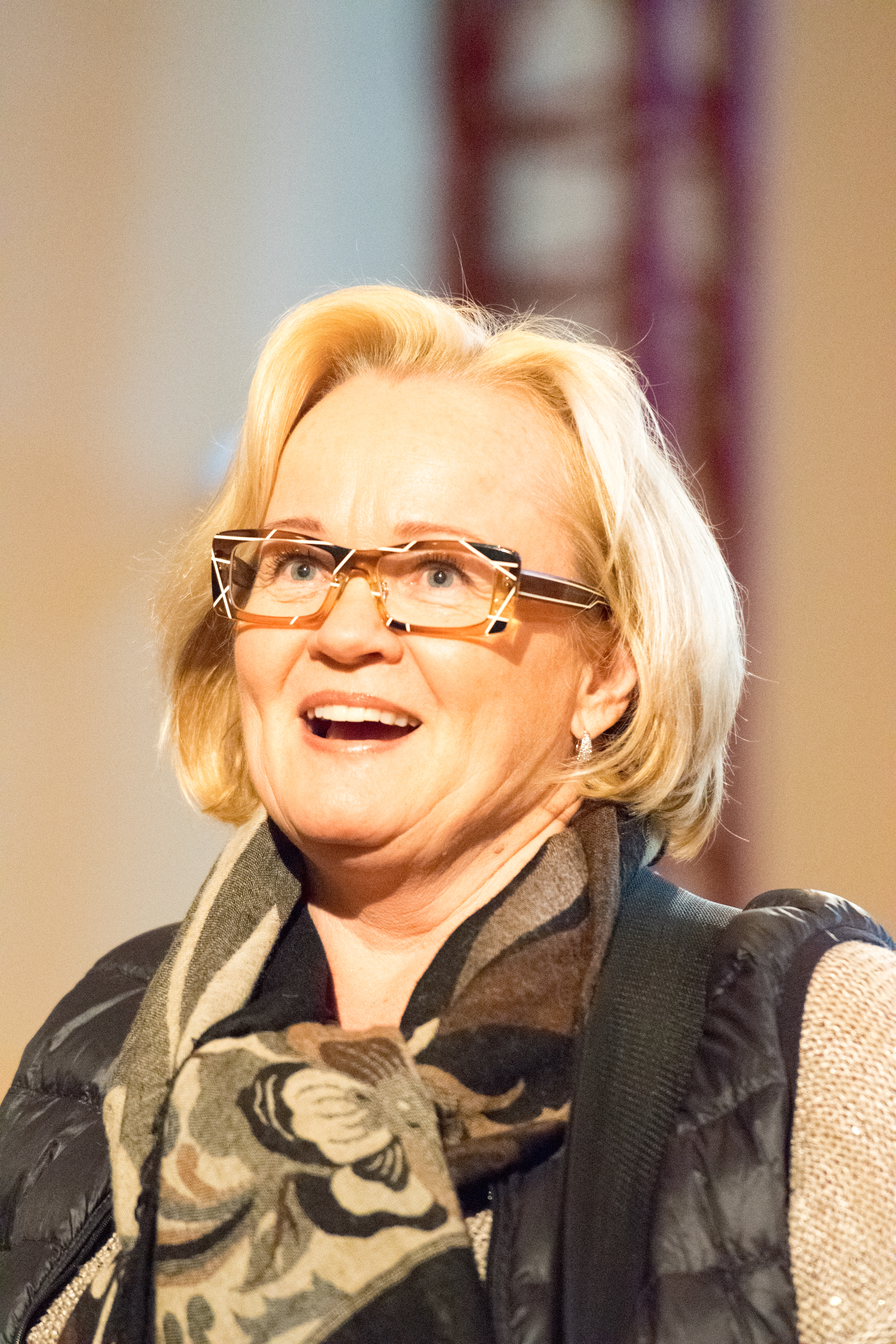 Eeva-Leena Pokela, suomalainen laulaja